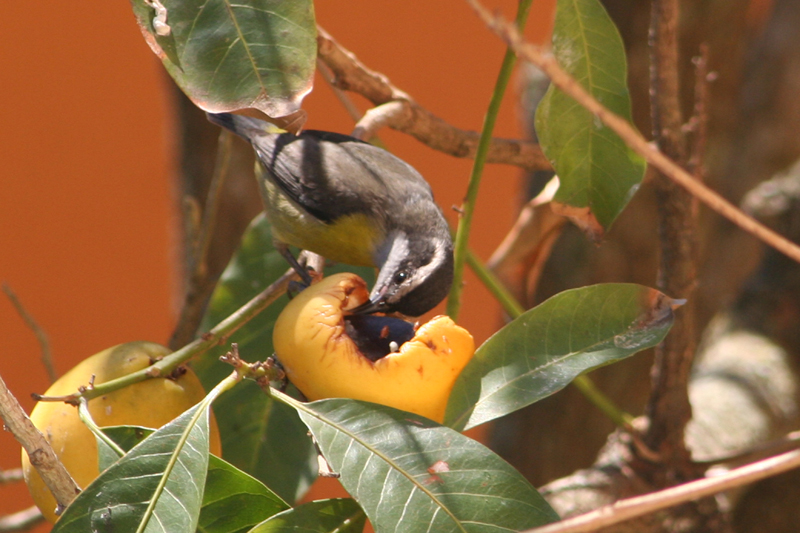 Domingo a tarde.. de boa em casa... sem fazer nada.... Olhei pela janela e ví no quintal essa Cambacíca saboreando um delicioso Abiú